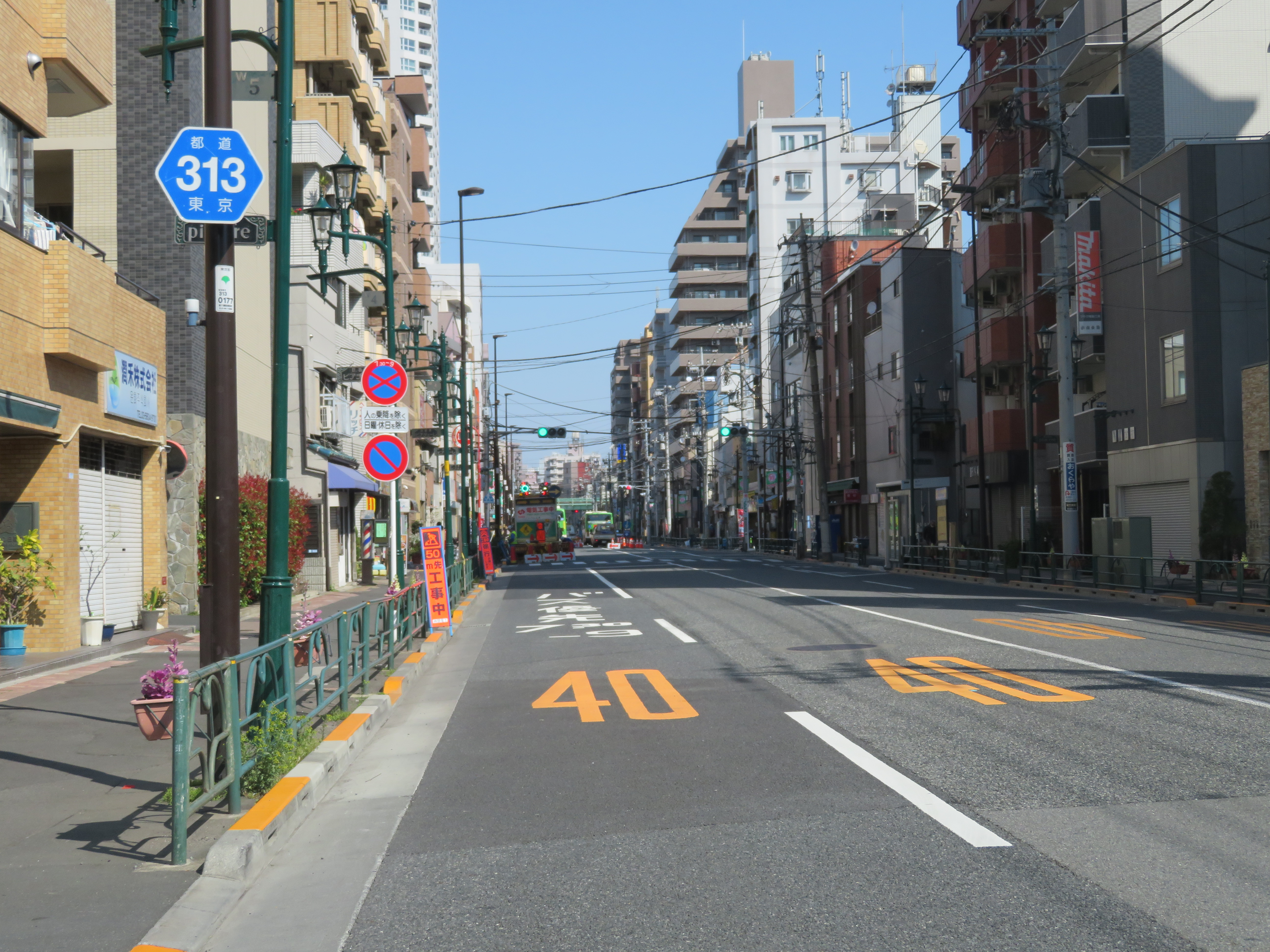 東京都道313号線（尾竹橋通り）荒川区東日暮里6丁目付近（町屋駅方面を撮影） Canon PowerShot SX720 HS